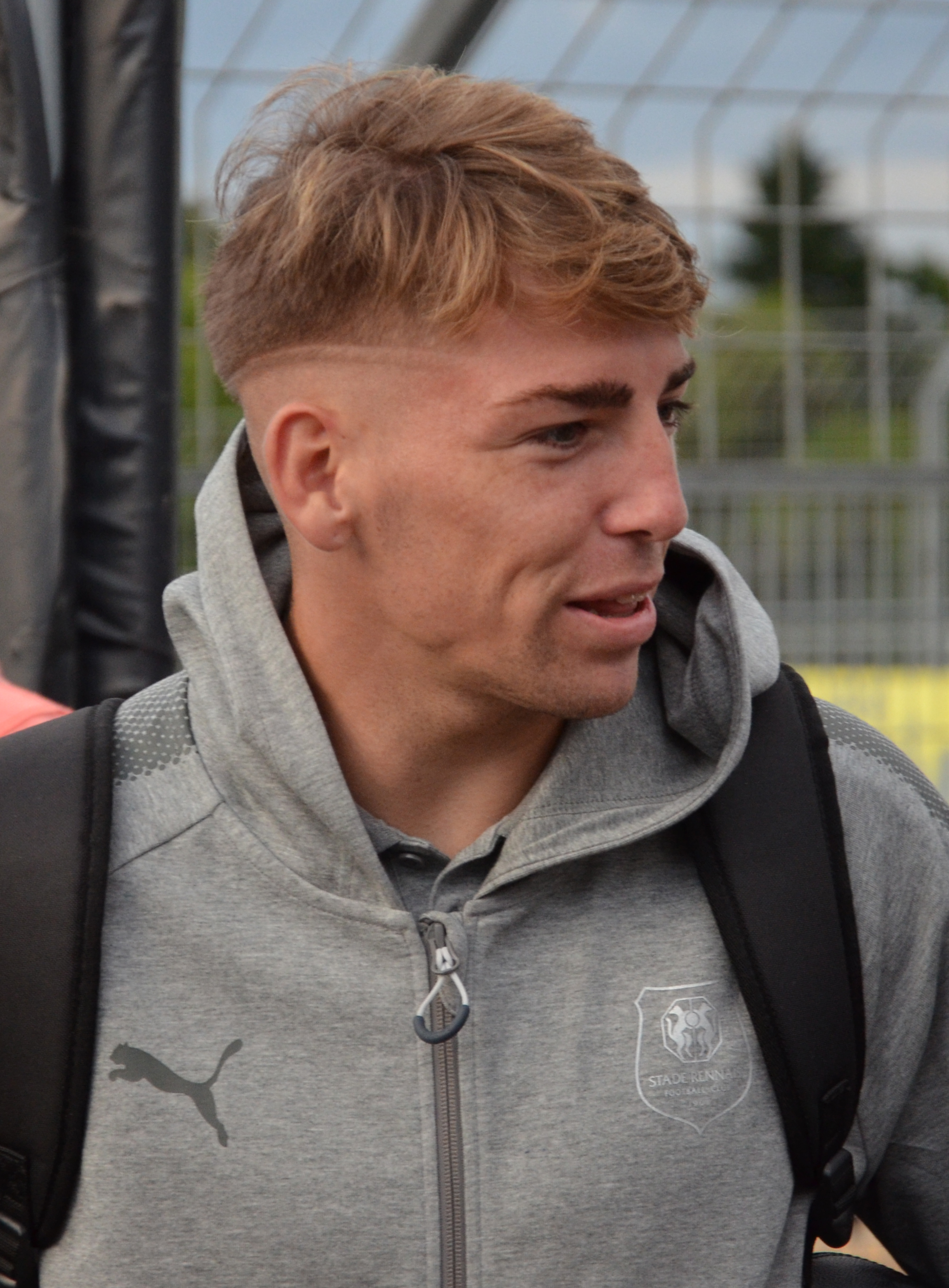 Photographie prise lors du match opposant le Stade rennais au SM Caen en match amical au stade Pierre-Compte de Vire le 22 juillet 2017. Ici, Brandon.